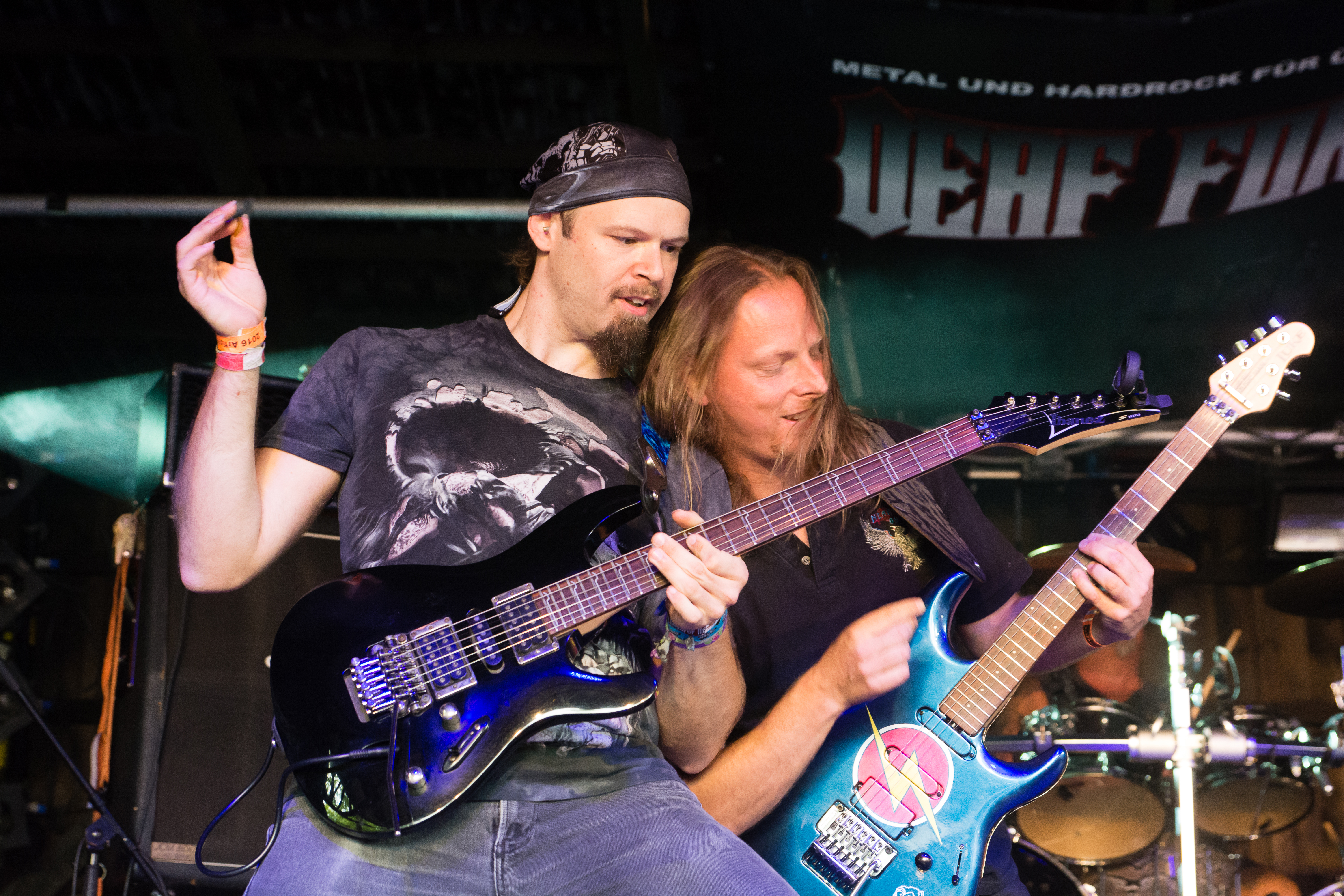 Ostrogoth beim Headbangers Open Air 2016